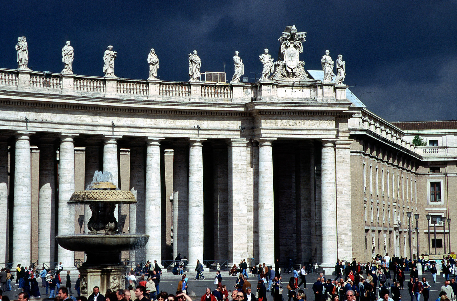 Piazza San Pietro